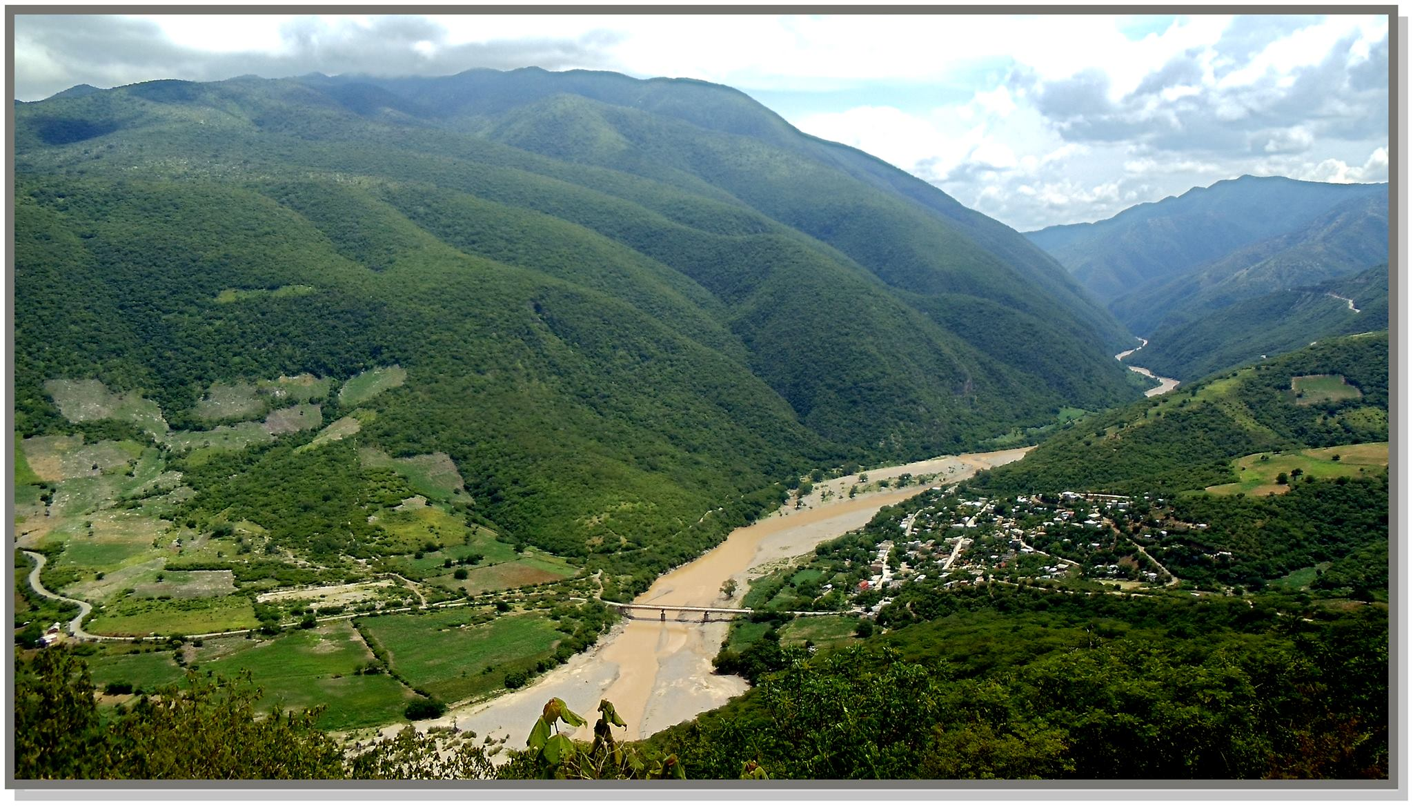 Papalulta durante el verano